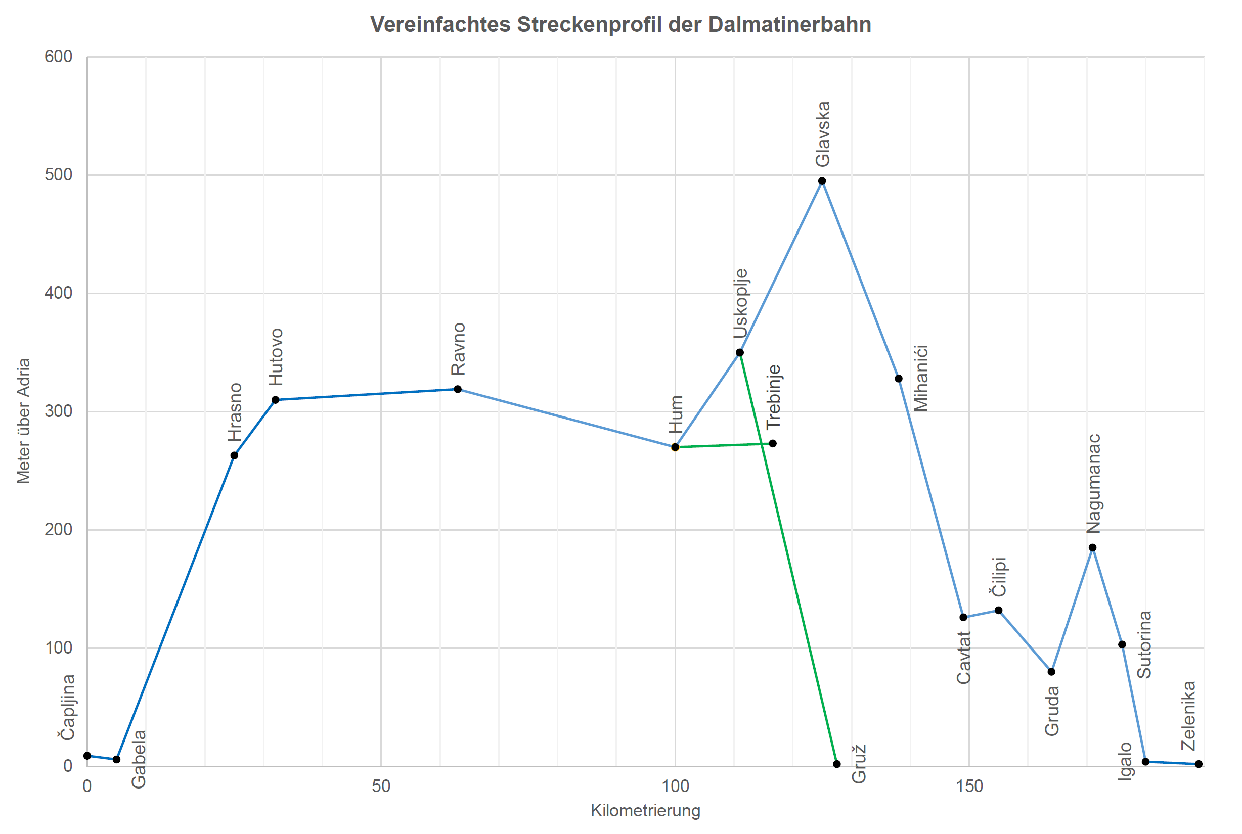 Vereinfachtes Streckenprofil der Dalmatinerbahn